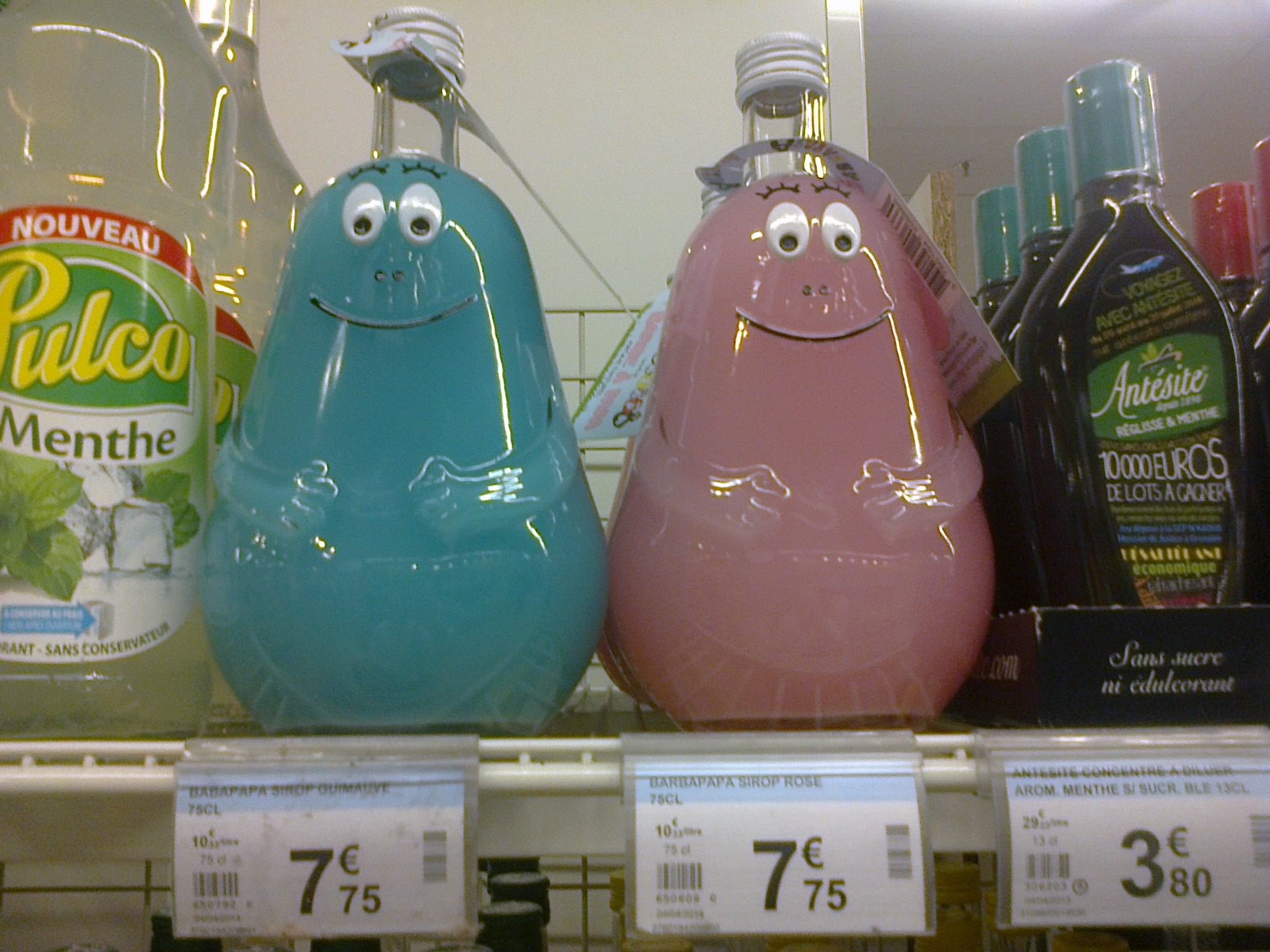 Bouteilles de sirop Barbapapa au magasin Carrefour Market de Boulogne-Billancourt